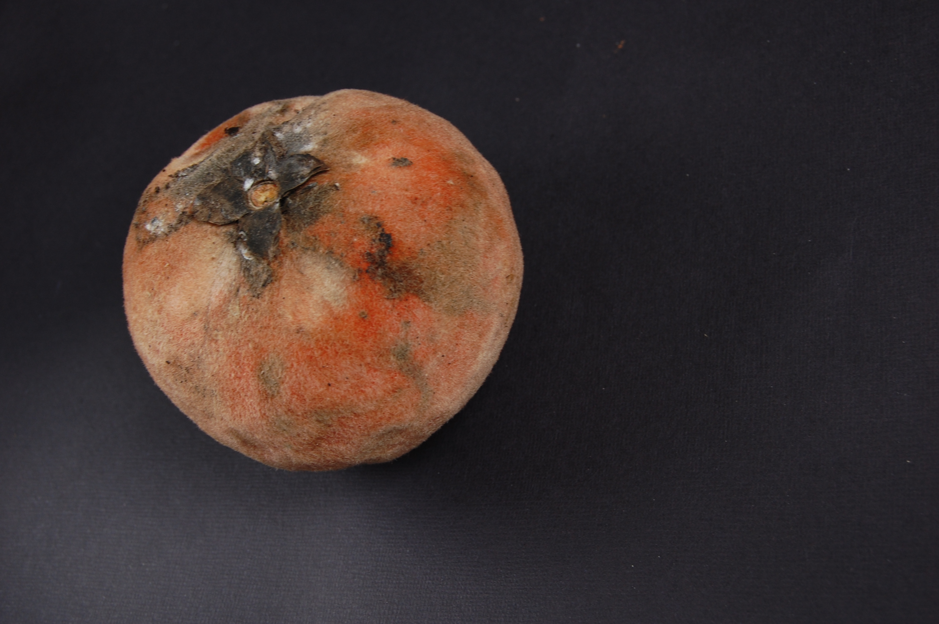 Buah Bisbul (Bahasa Indonesia), Buah Mentega (Bahasa Melayu), Mabolo (English), Diospyros blancoi